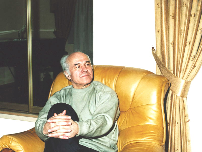 Maestro Doga.